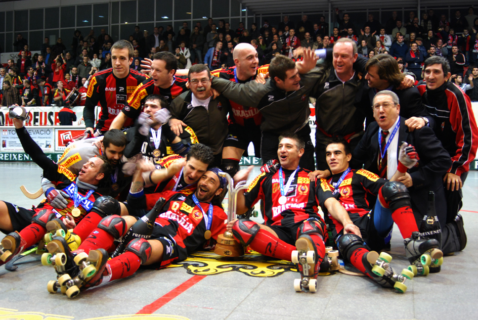 L'equip del Tecnol Reus Deportiu, al conquistar la seva primera Copa Continental d'Hoquei Patins.